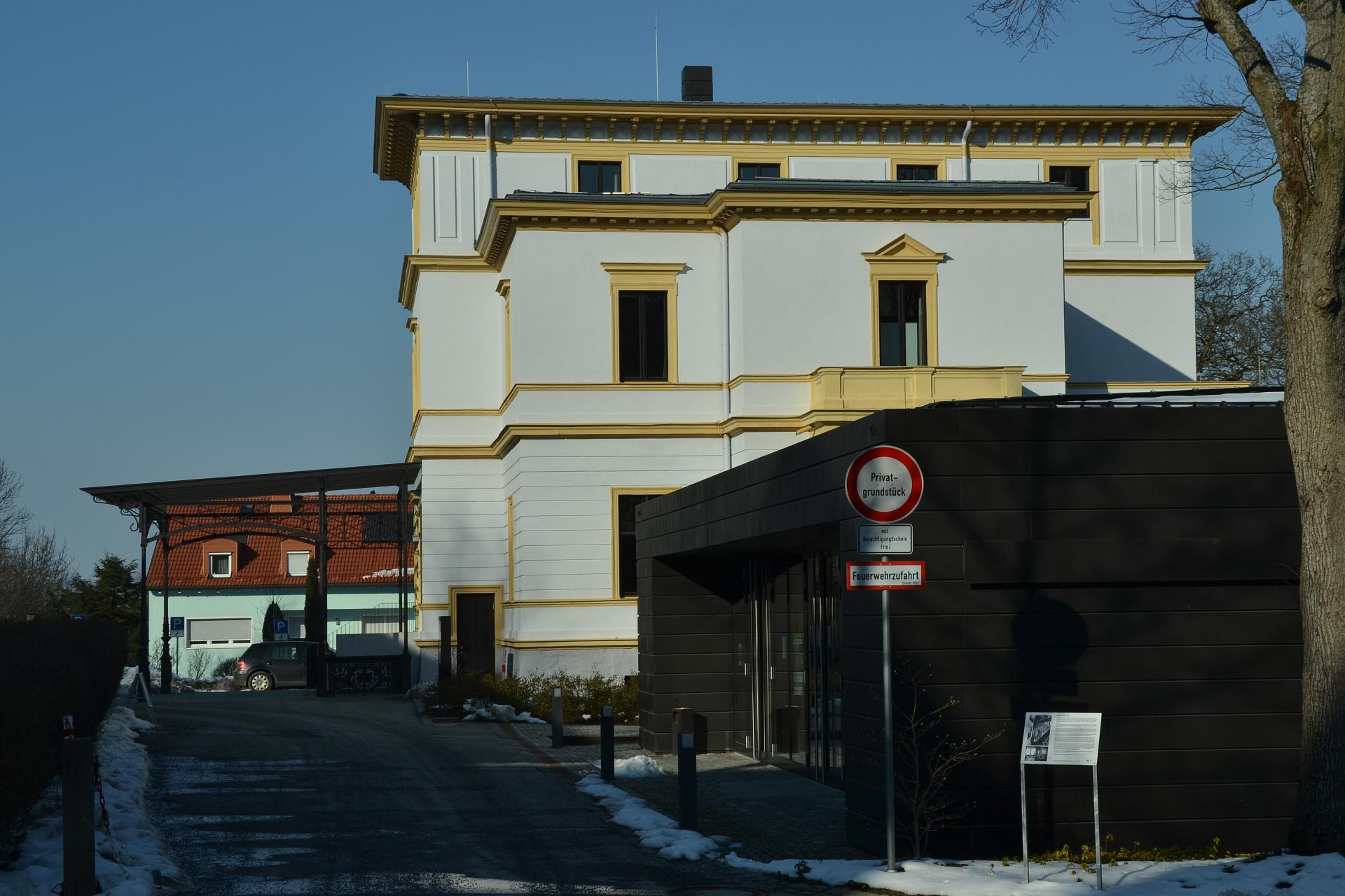 Münch-Ferber-Villa in Hof